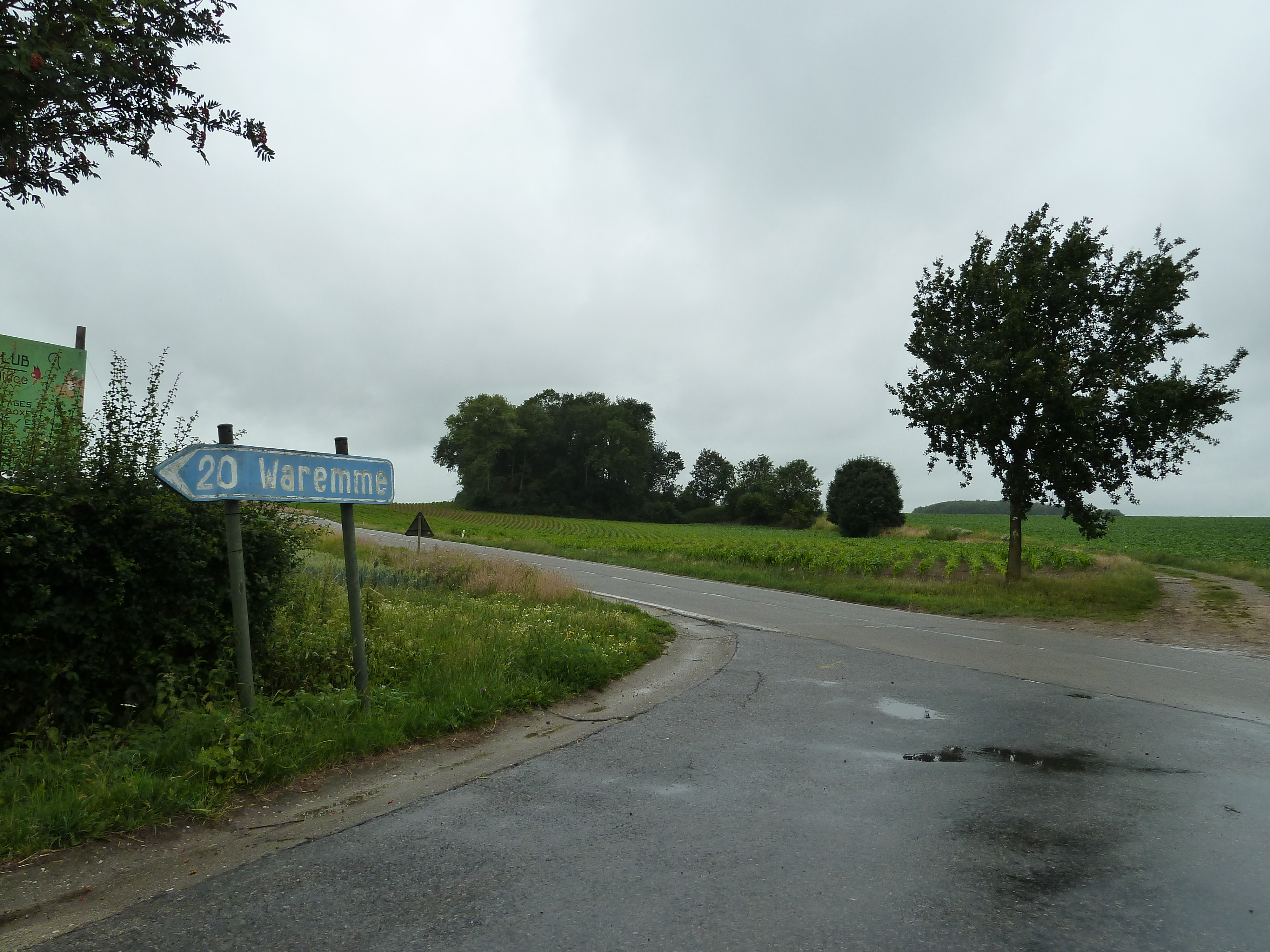 Tumuli du Soleil, Ambresin, Wasseiges, Belgique